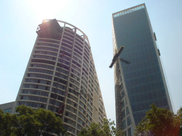 Complejo Reforma 222, Centro Financiero y Torre Residencial, en la Ciudad de México.